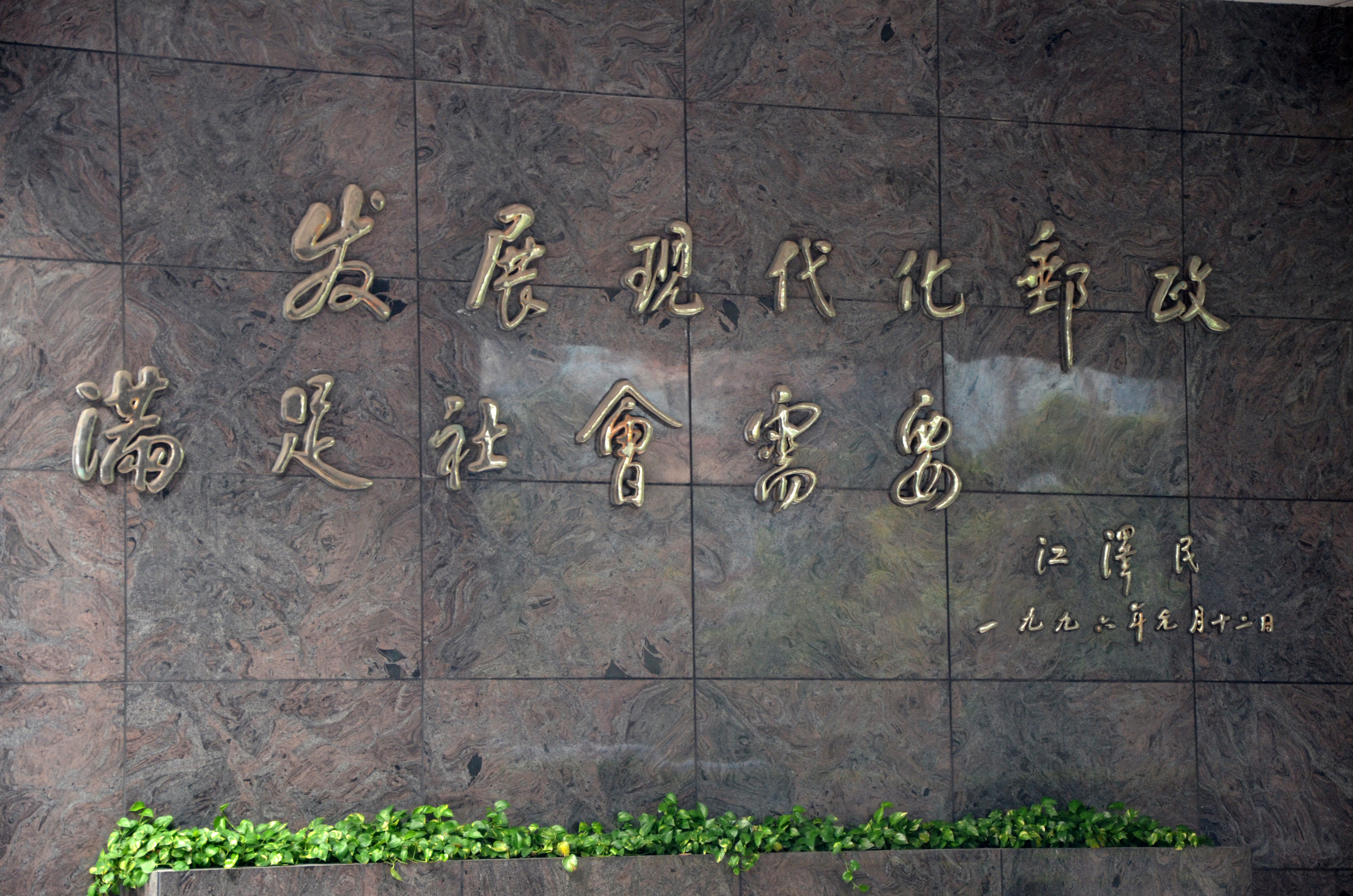 江澤民1996年1月12日題字：「發展現代化郵政，滿足社會需要。」位於廣東省郵政公司（天河北路信源大廈）。